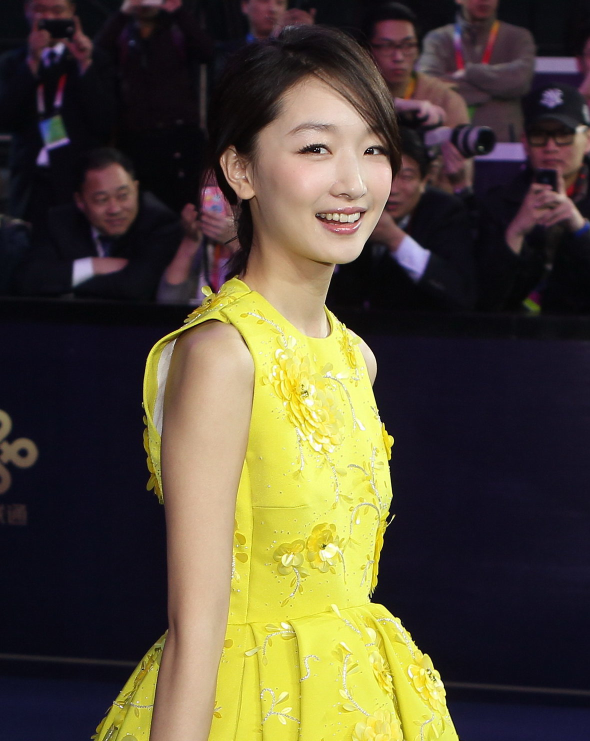 北京时间2013年4月23日晚，周冬雨在北京国际电影节闭幕式上